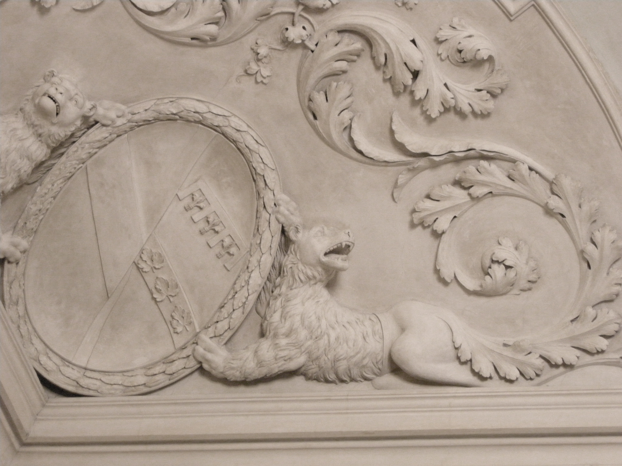 Palazzo compagni, salone, stucchi